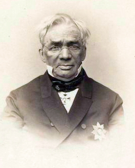 Греч, Николай Иванович